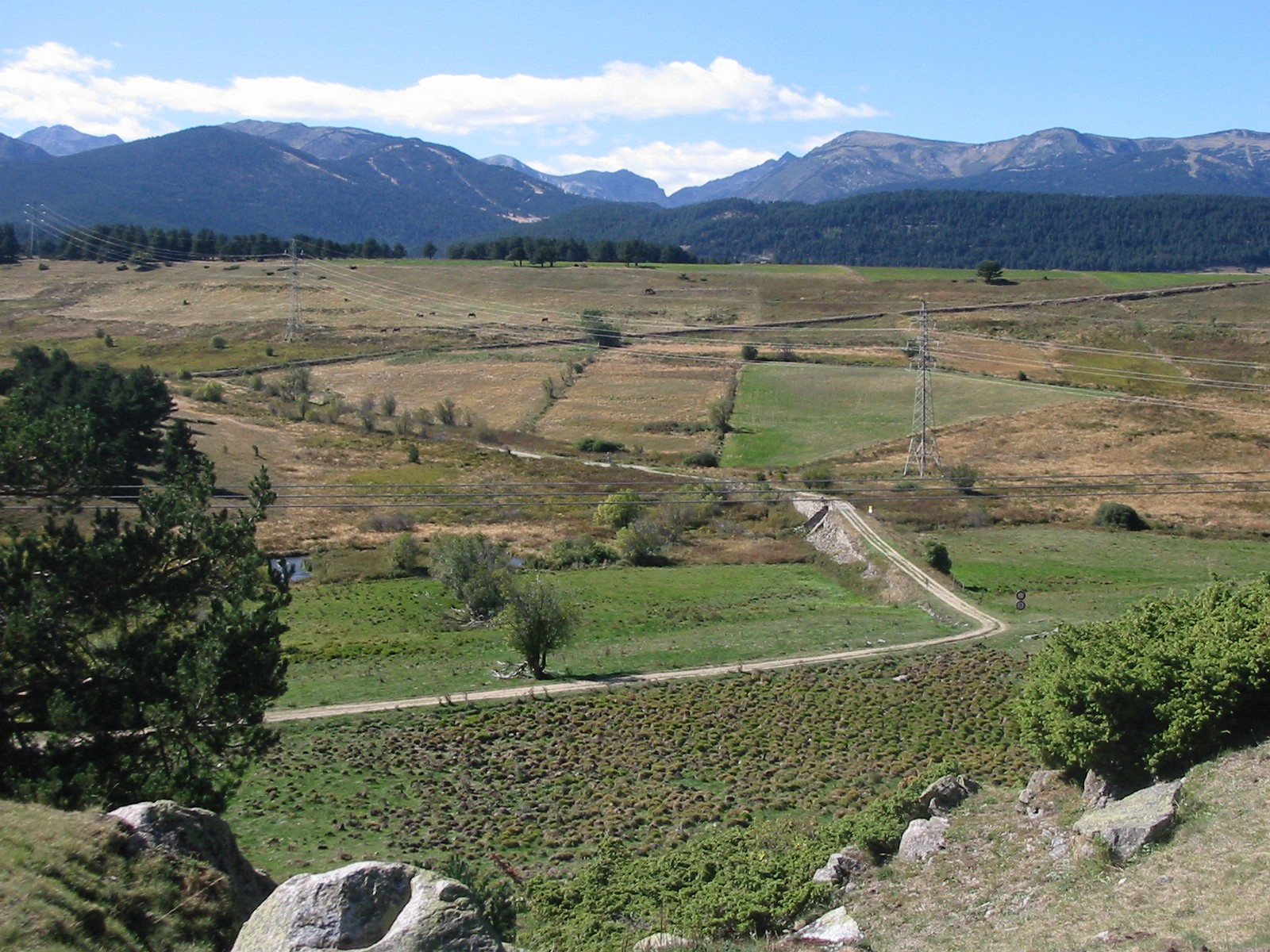 L'Aude et le Capcir en automne vus de la tour de Creu, Matemale, Pyrénées-Orientales, France